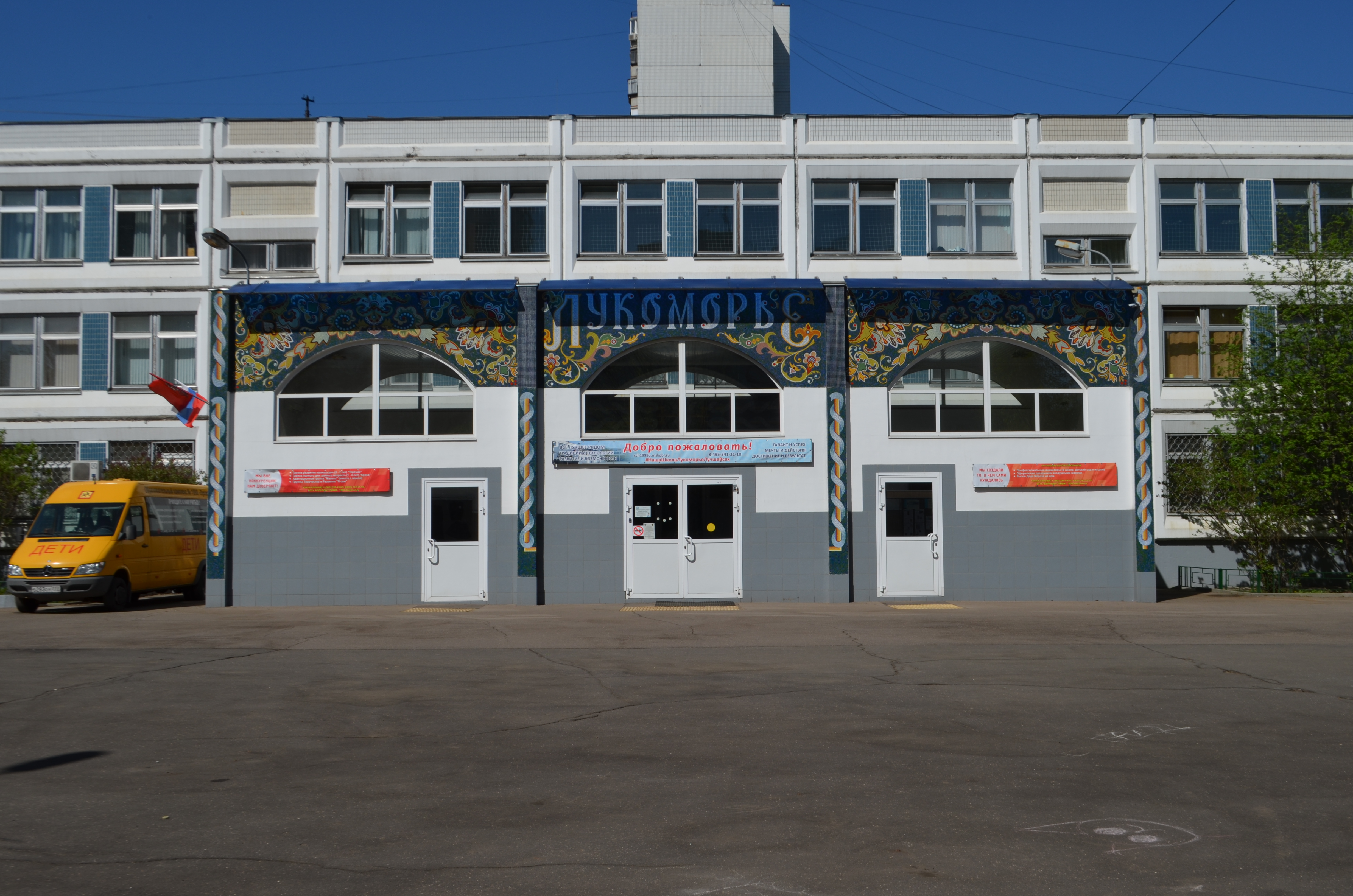 Фотография школы (Центра Образования) № 1998 «Лукоморье» в московском районе Братеево